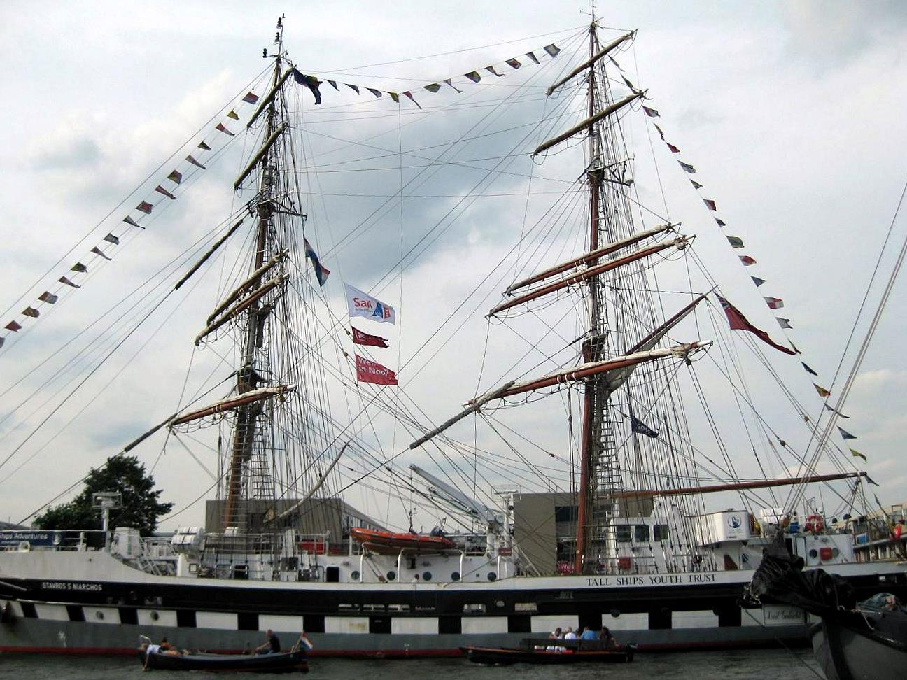 Zeilschip Stavros & Niarchos tijdens Sail Amsterdam 2010